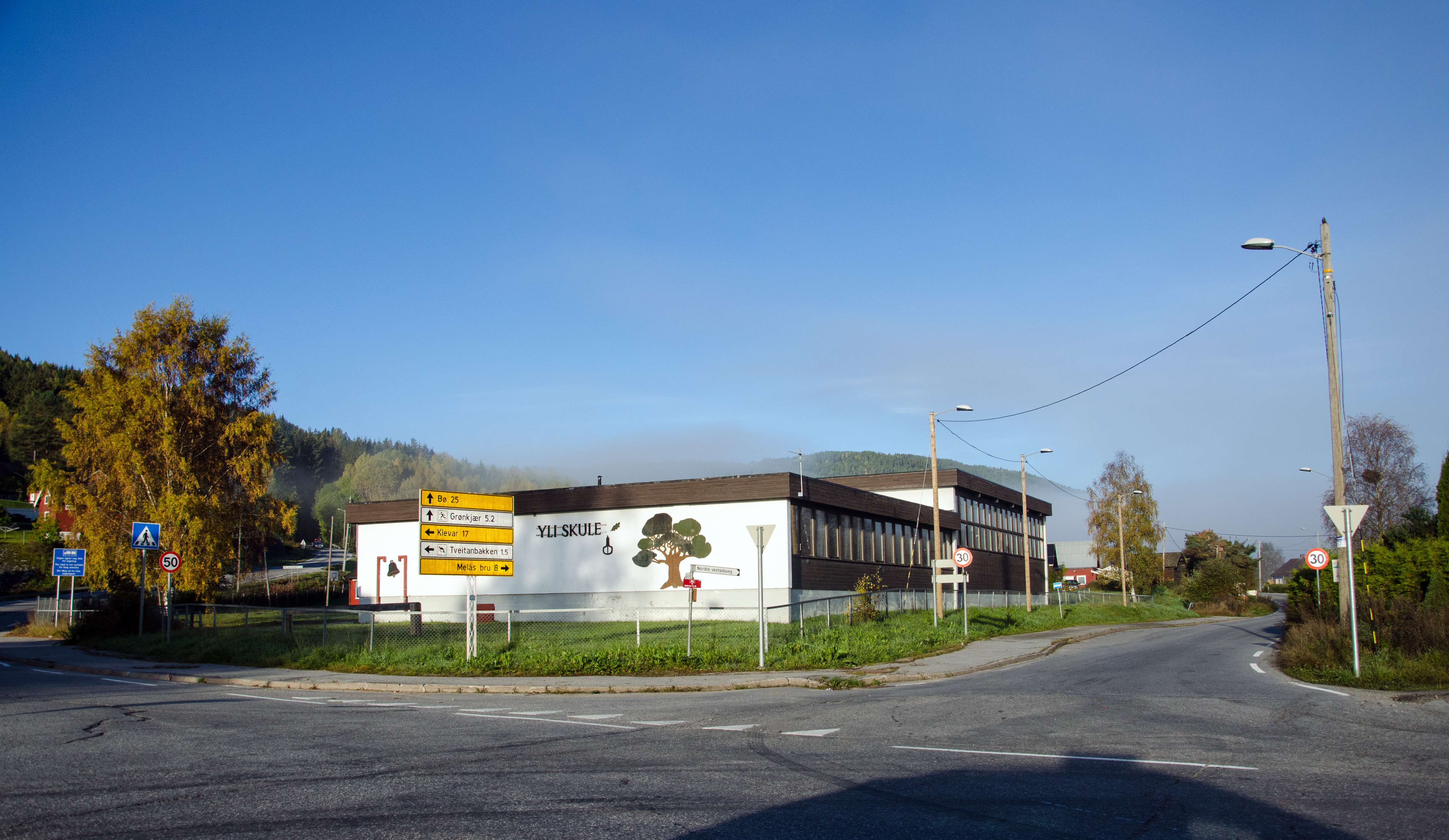 Yli skule, nedlagt 2014